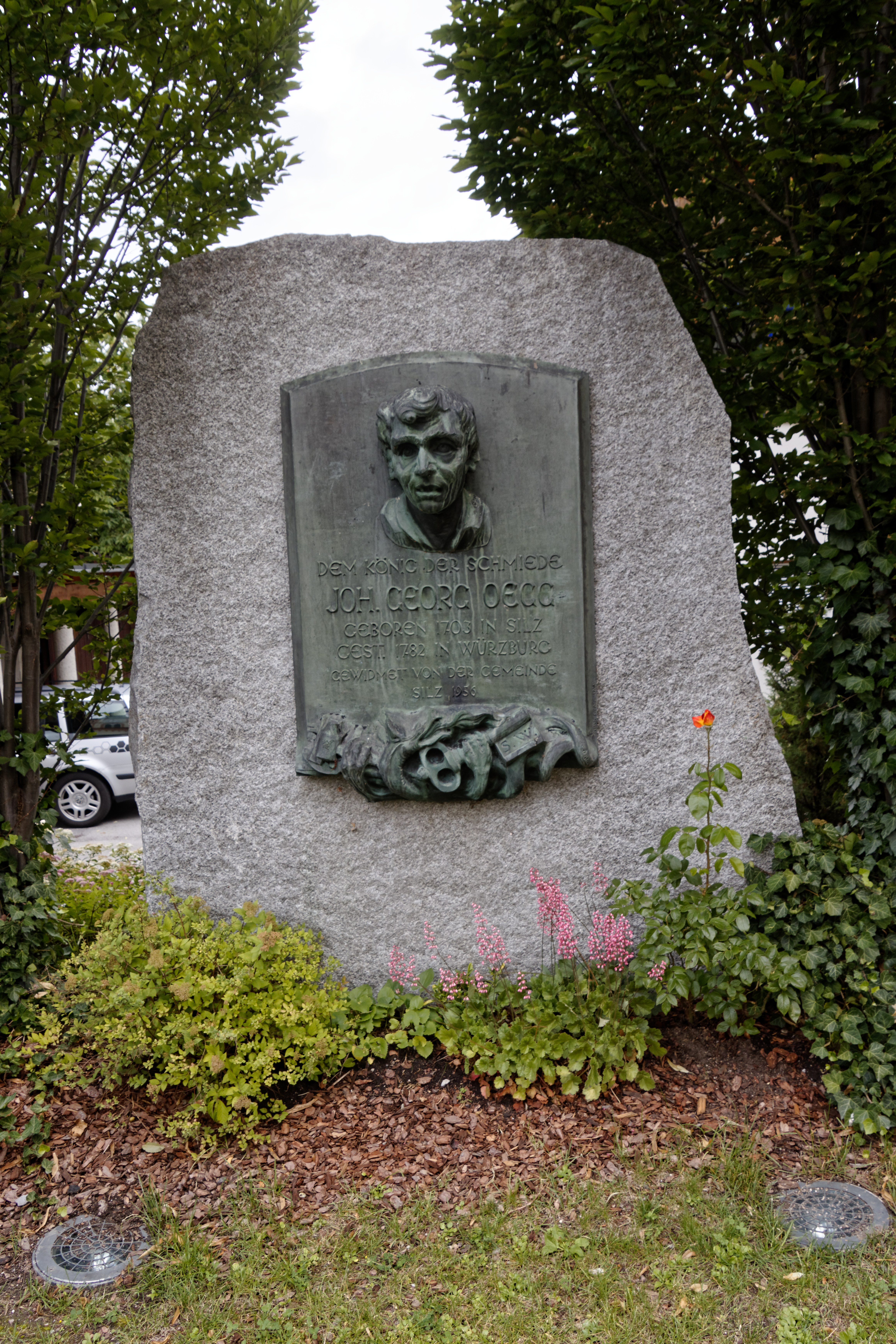 Gedankstein Johann Georg Oegg; errichtet 1956 von seiner Geburtsgemeinde Silz